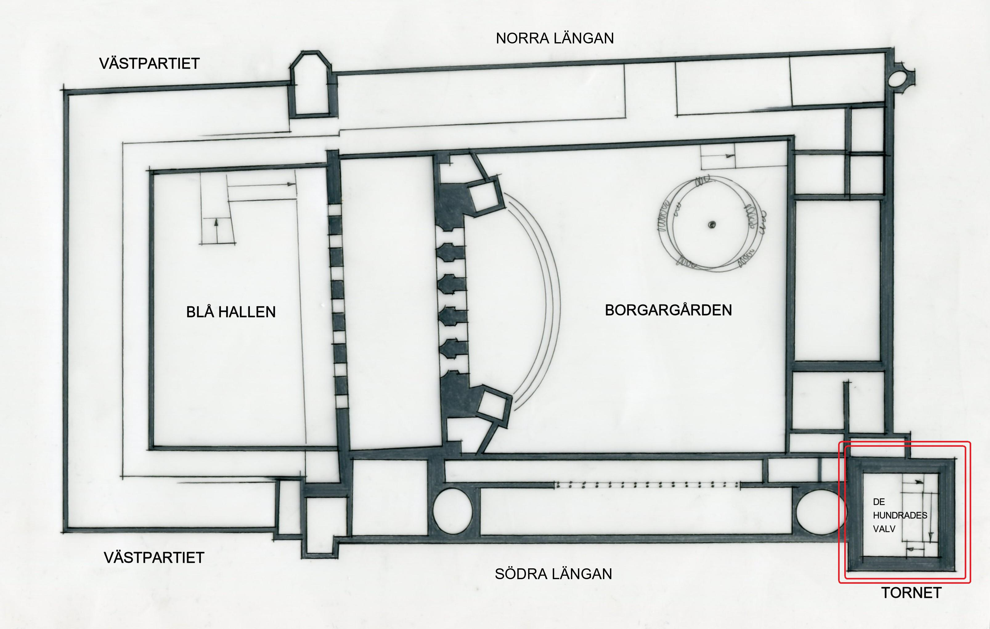 Stockholms stadshus översiktsplan våning 1 trappa, De Hundrades valv